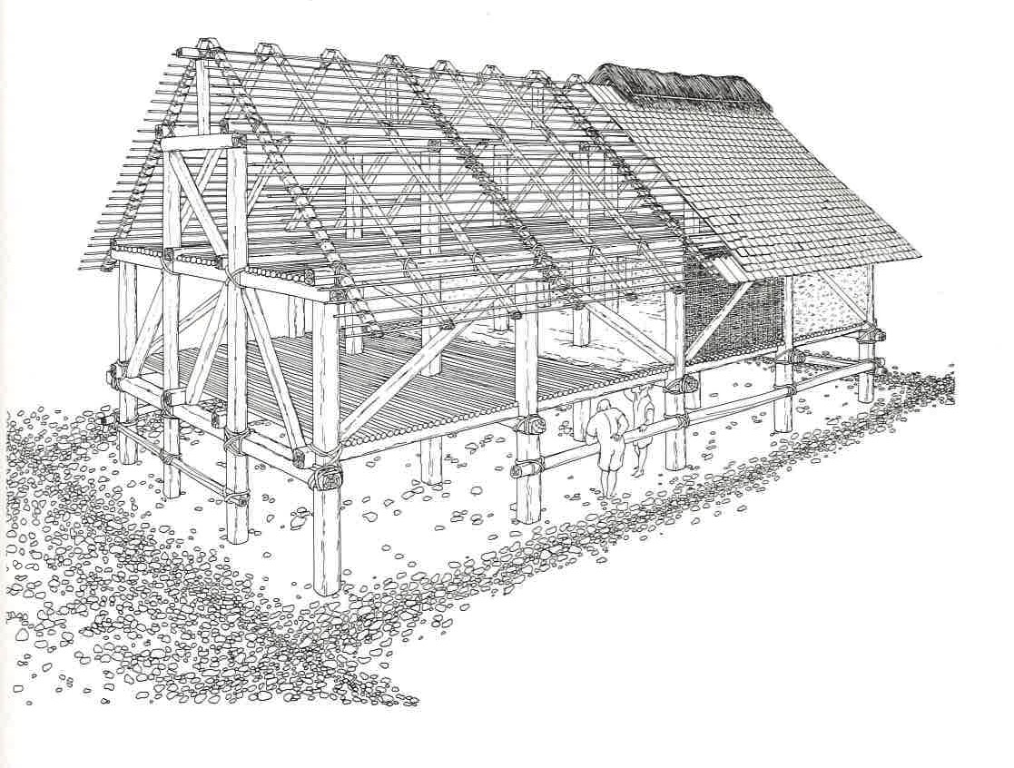 Reconstitution graphique d'une maison de Cortaillod-Est avec deux niveaux d'utilisation. Tiré de ARNOLD B.1990 : Cortaillod-Est et les villages du lac de Neuchâtel au Bronze final 6, Structure de l'habitat et proto-urbanisme. Ed. du Ruau, Saint-Blaise. p. 79